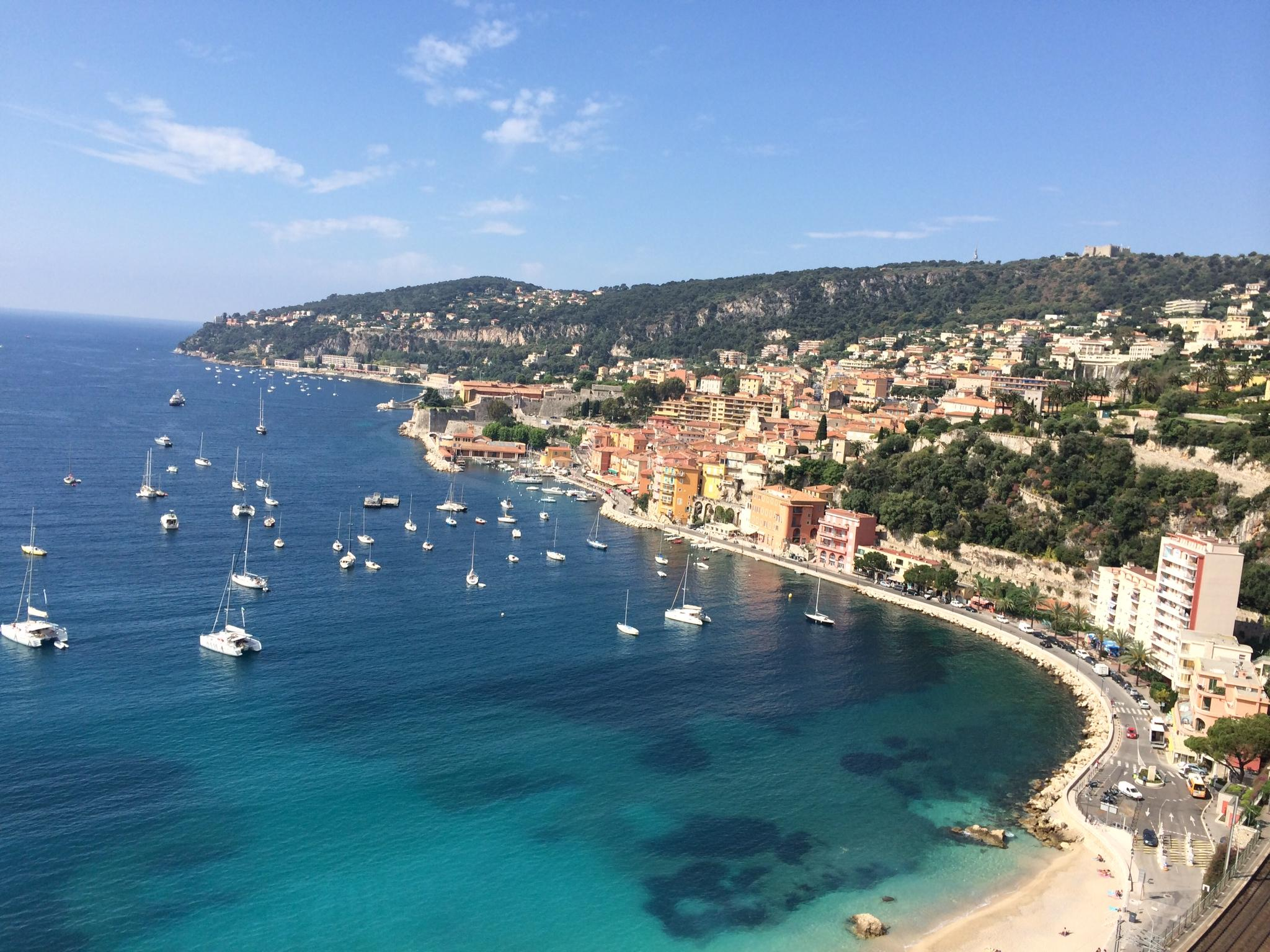 La mer d'un bleu magnifique à Nice